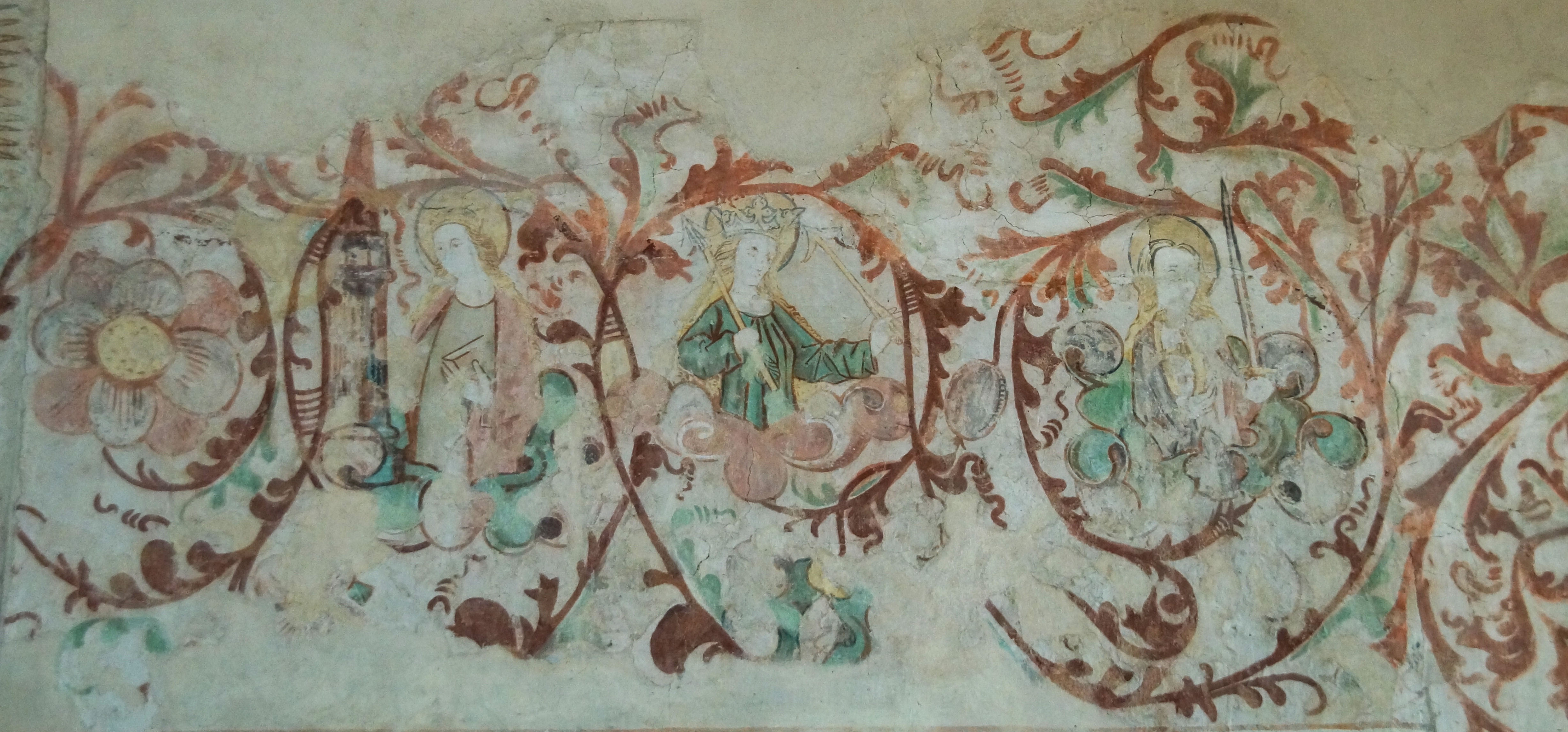 Fresko im westlichen Teil der Klosterkirche Bursfelde (Ostwand, hinter dem Altar)